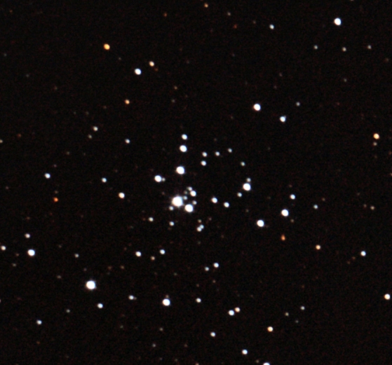 Cúmulo Abierto M21